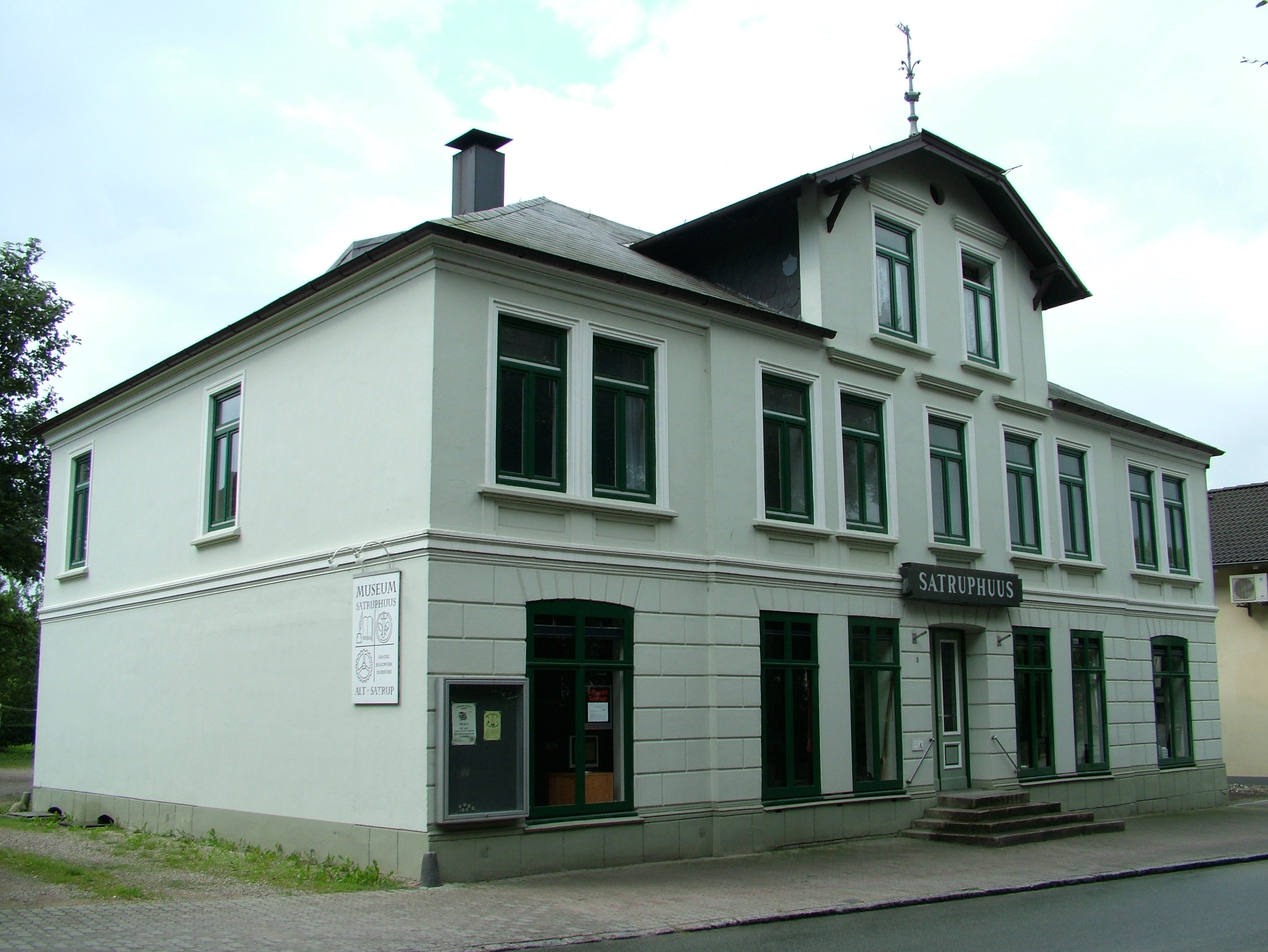 Satrup, Schleswig-Holstein, das Satruphuus, das Heimatmuseum